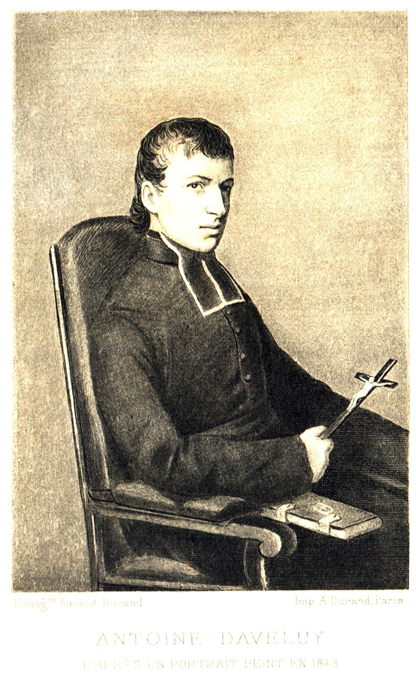 Antoine Daveluy, évêque missionnaire français en Corée et martyr.